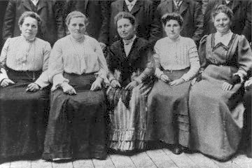 Teilnehmerinnen der 1. sozialdemokratischen Frauenkonferenz am 15.09.1900 in Mainz